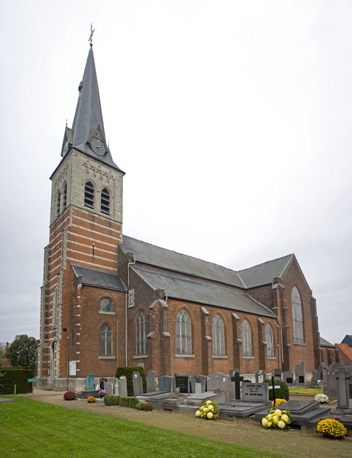 Parochiekerk Sint-Michiel te waarloos (Kontich)